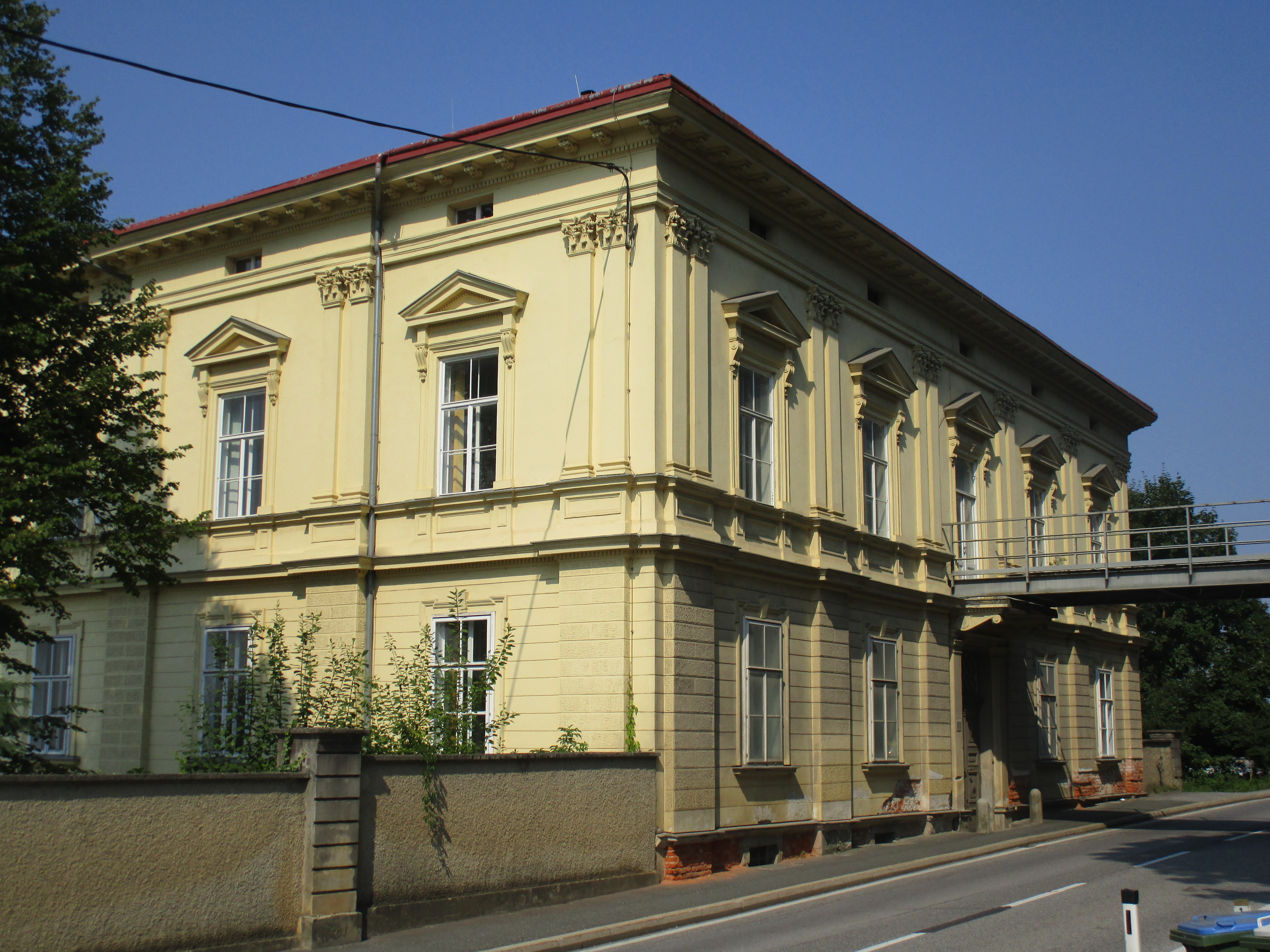 Schloss Spielerhof (Grambach) von Osten